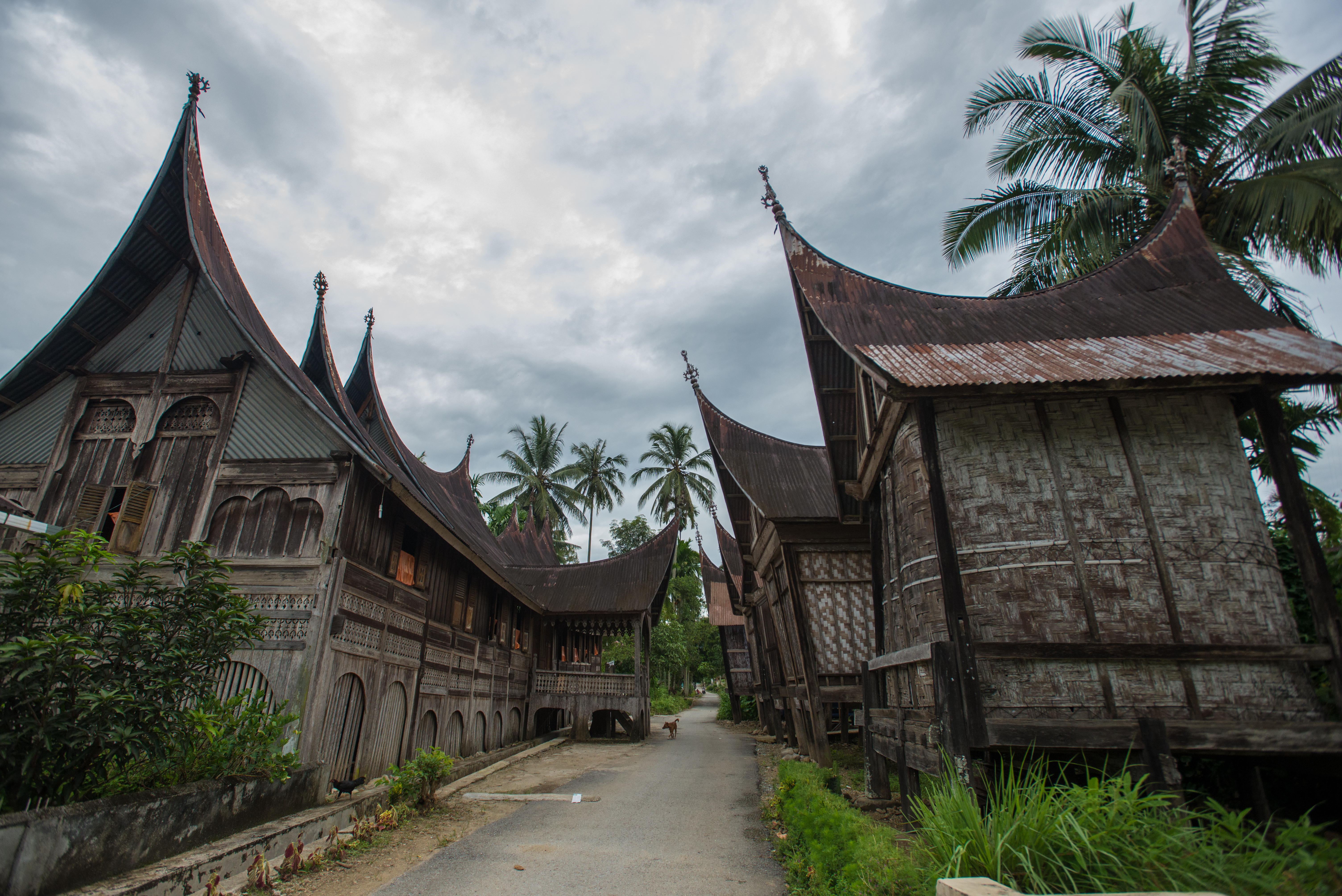 Rumah Gadang